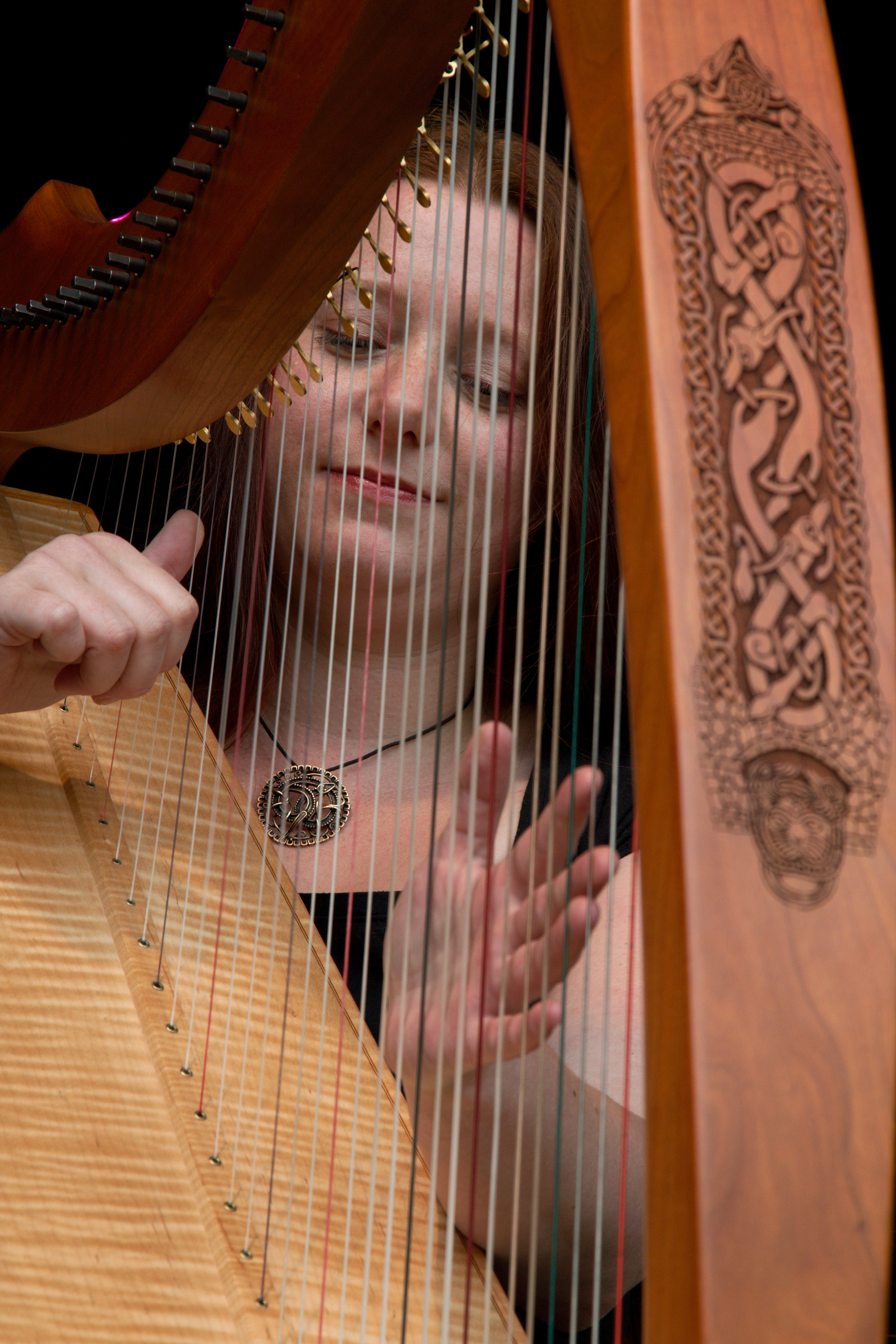 Kelten zonder grenzen